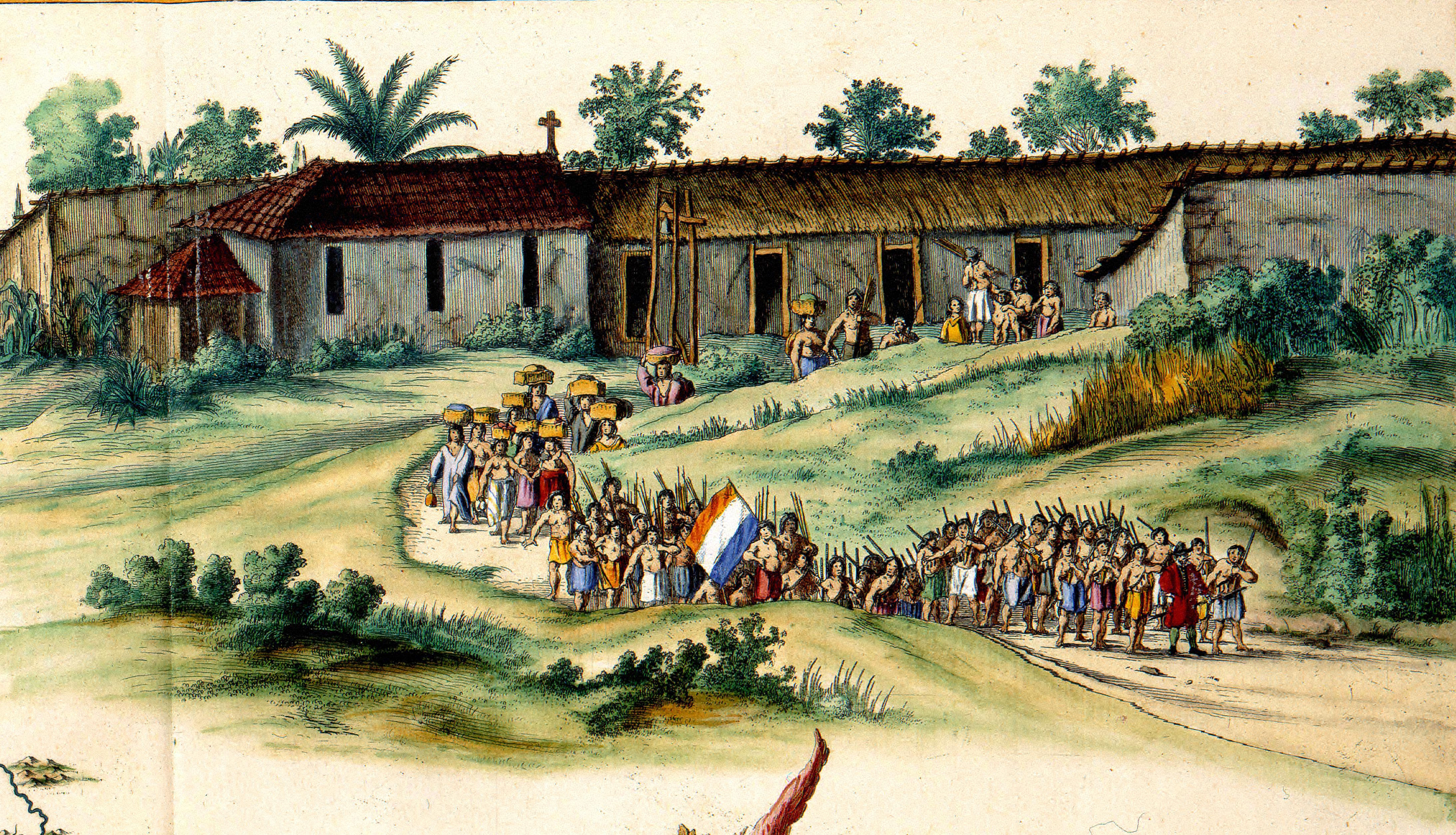 Détail van de kaart: Præfecturæ de Paraiba, et Rio Grande (Engenho na Paraíba 1645.)